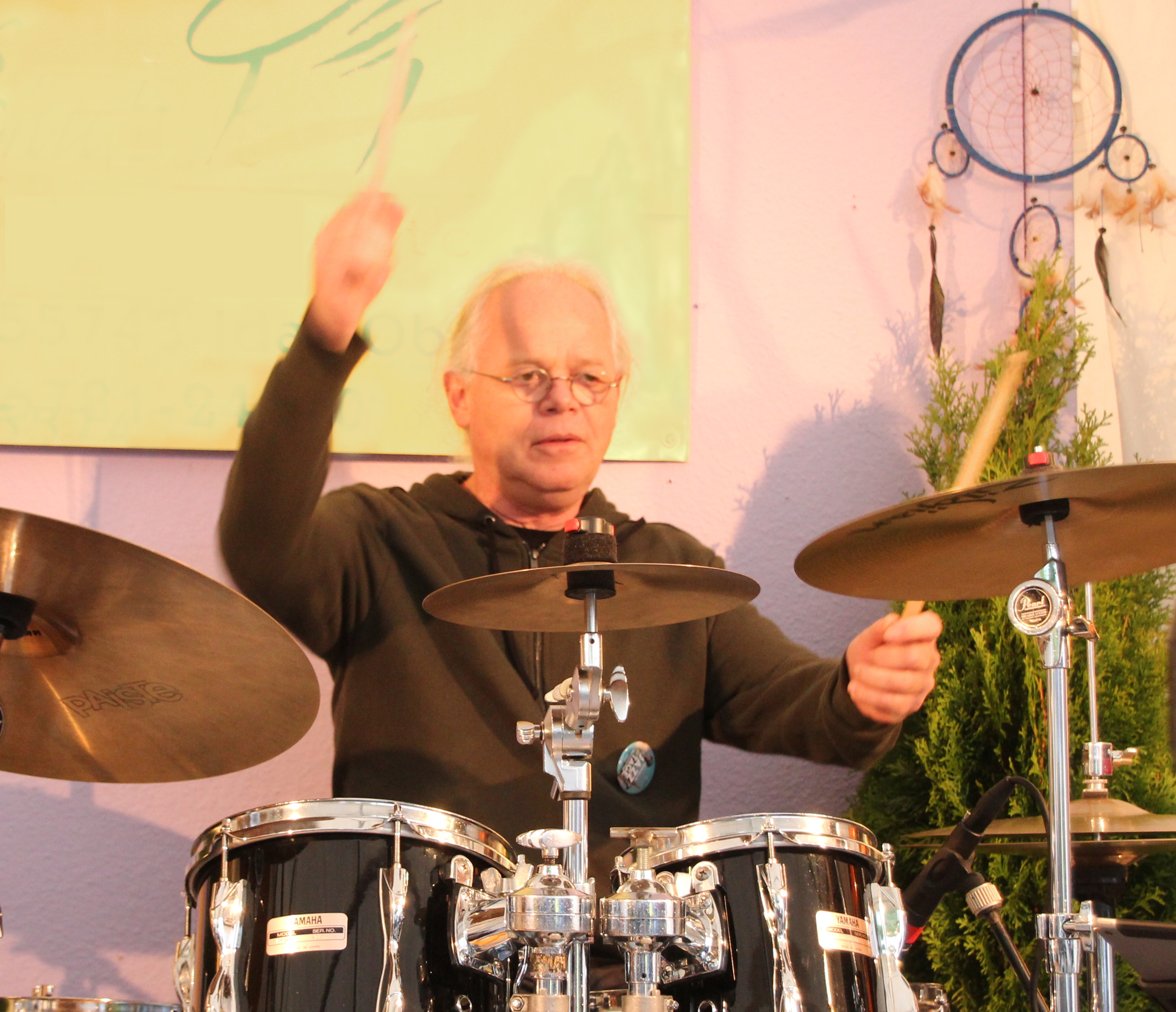 Bildinhalt: Peter Götzmann bei den Jazztagen Idar-Oberstein 2017 Aufnahmeort: Idar-Oberstein, Deutschland Die dargestellte Person wurde bei einem öffentlichen Auftritt fotografiert.